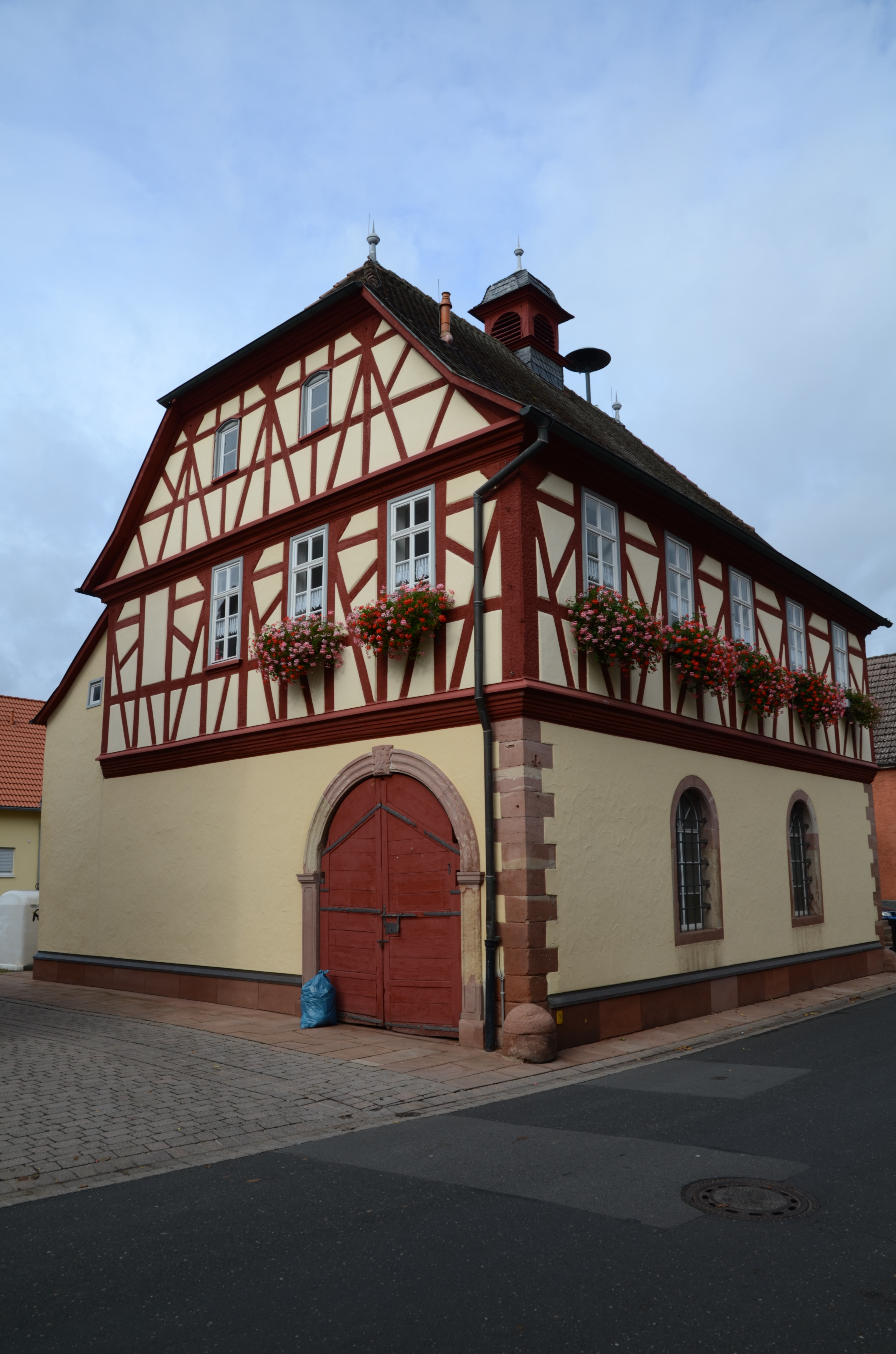 Kleinheubach Marktstraße 33, altes Rathaus von Süden